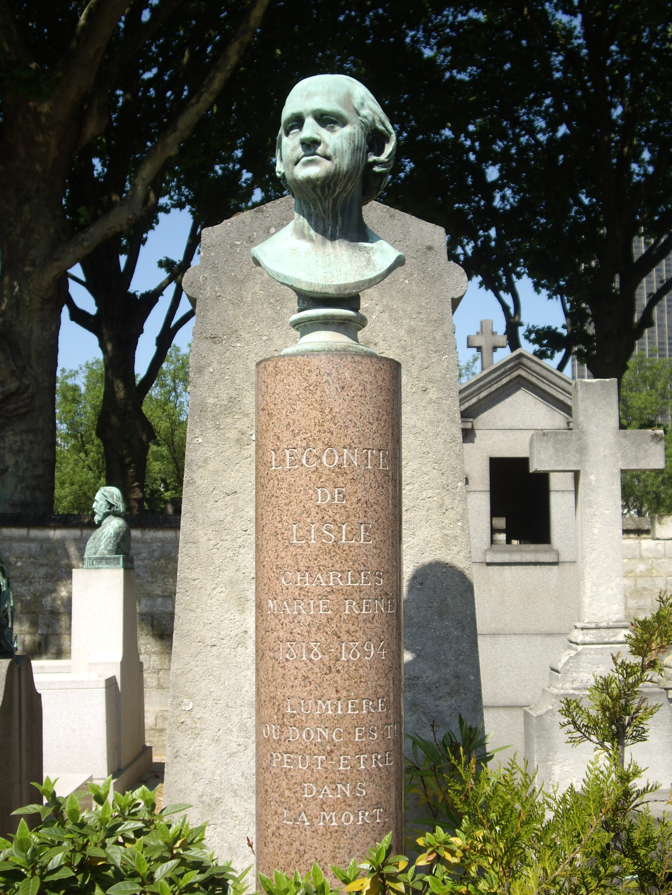 Cénotaphe de Leconte de Lisle, cimetière du Montparnasse, division 17 (petit cimetière). Sur la colonne est inscrit le dernier vers du poème In excelsis (Poèmes barbares) : « Lumière, où donc es-tu ? Peut-être dans la mort. » La tombe de Leconte de Lisle fut transférée au cimetière marin de Saint-Paul de la Réunion en 1977.